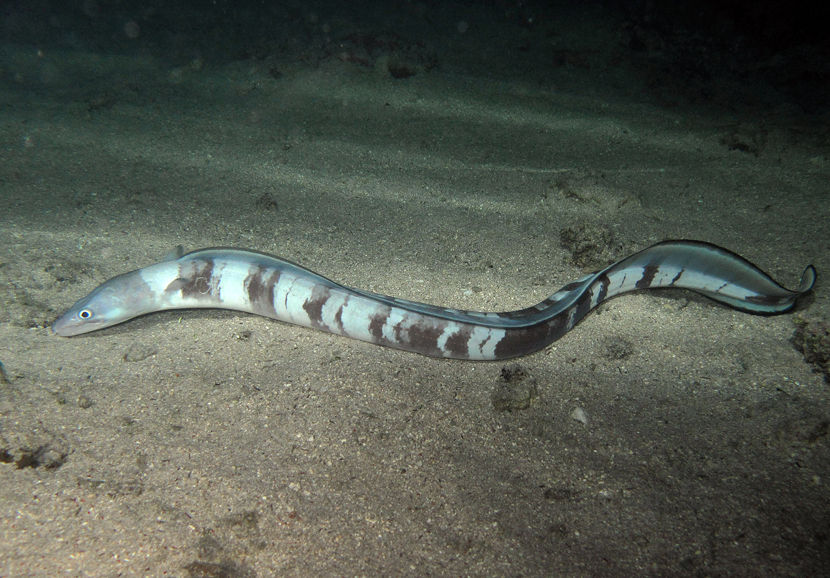 Un congre à moustache (Conger cinereus) à la Réunion.